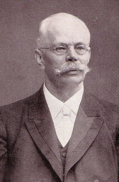 Karl Heinrich war der erste und maßgebliche Corpshistoriker der Masovia.